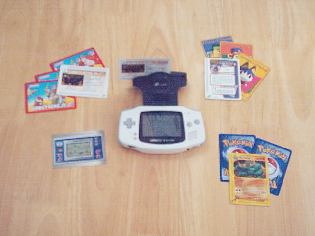 Ein Game Boy Advance mit aufgestecktem Nintendo Card e-Reader und diverse e-Cards andere Versionen: keine